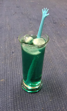 Den gamla drinken Gröna Hissen, gjord på Blå Curacao, mycket god !